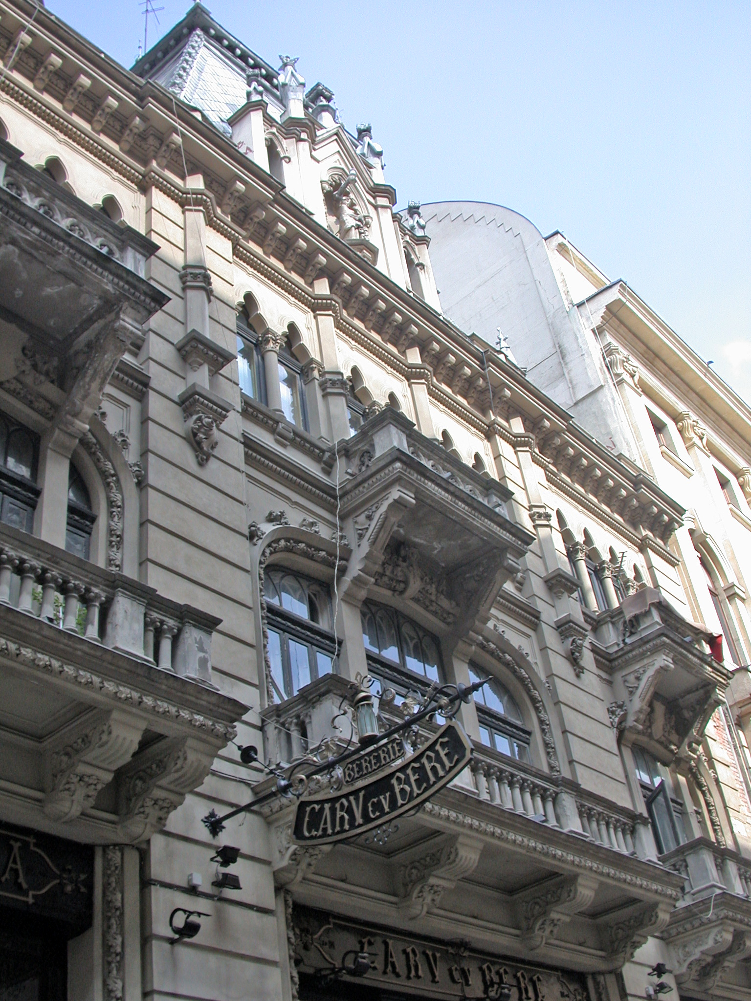 Romania, Bucarest, CaryCvBere (locale storico)